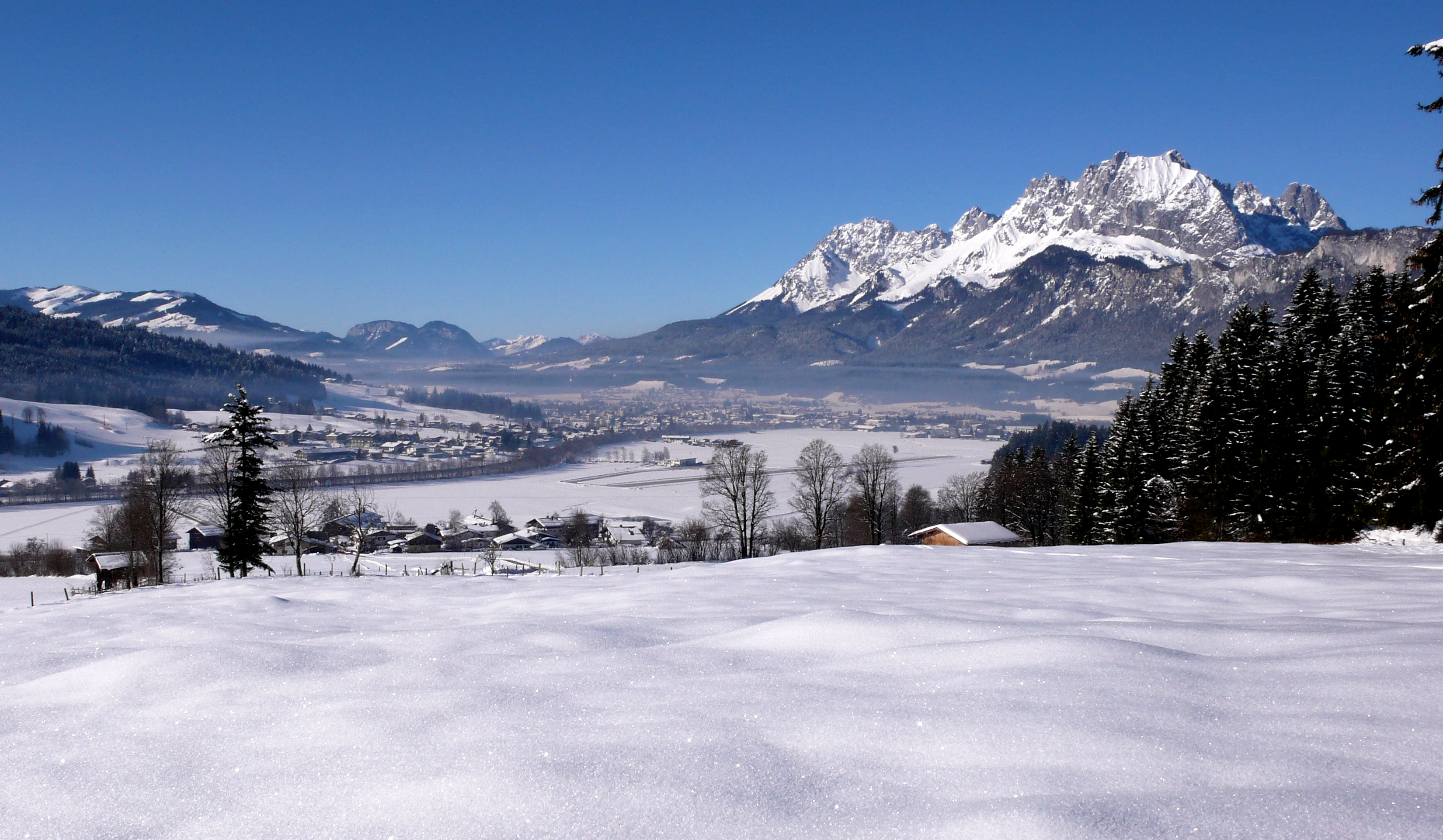 St. Johann in Tirol Kaisergebirge, von links nach rechts: Kitzbüheler Alpen, großer und kleiner Pölven, ganz hinten wahrscheinlich Pendling, Kaisergebirge (Treffauer, vermutlich das Sonneck, Ellmauer Halt, vermutlich Regalmwand, Ackerlspitze, Maukspitze, Lärcheck, vorgelagert der Niederkaiser)